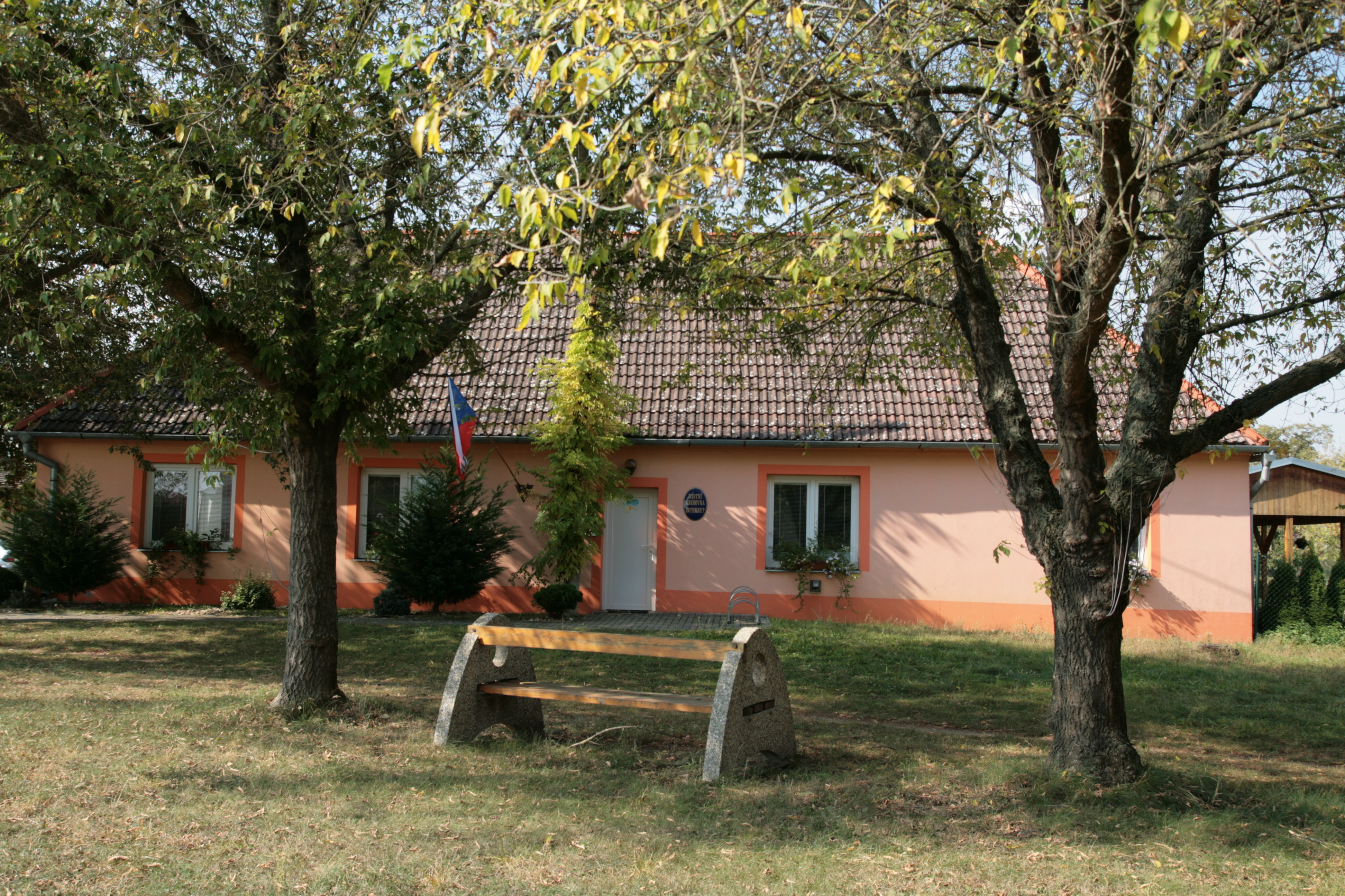 Obec Křídlůvky v okrese Znojmo. Obecní úřad s lavičkou, čelní pohled od východu.